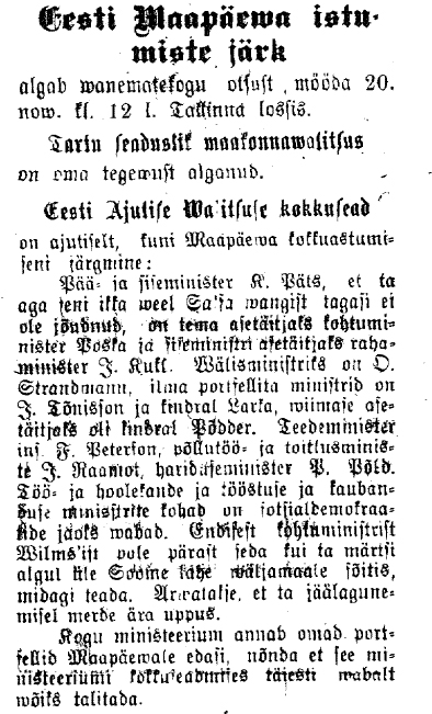 Postimees, 15. november 1918. Uus Ajutise valitsuse koosseis.